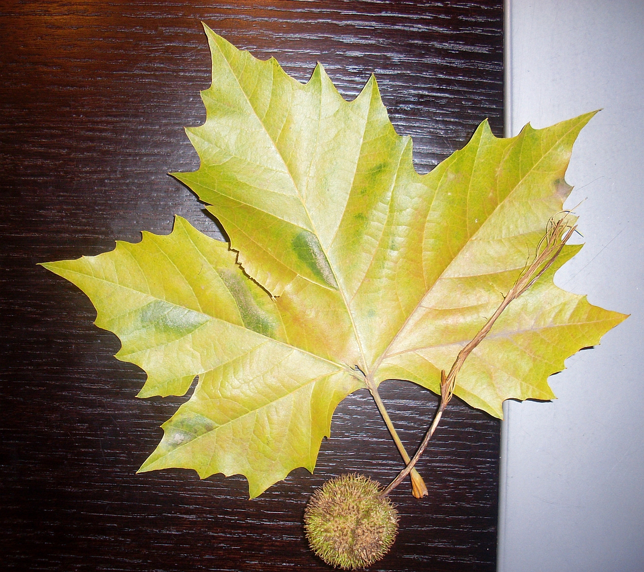 Blatt und Frucht eines unbekannten Baumes